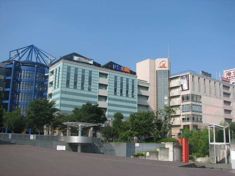 センター南駅前にある港北東急/港北東急百貨店SC